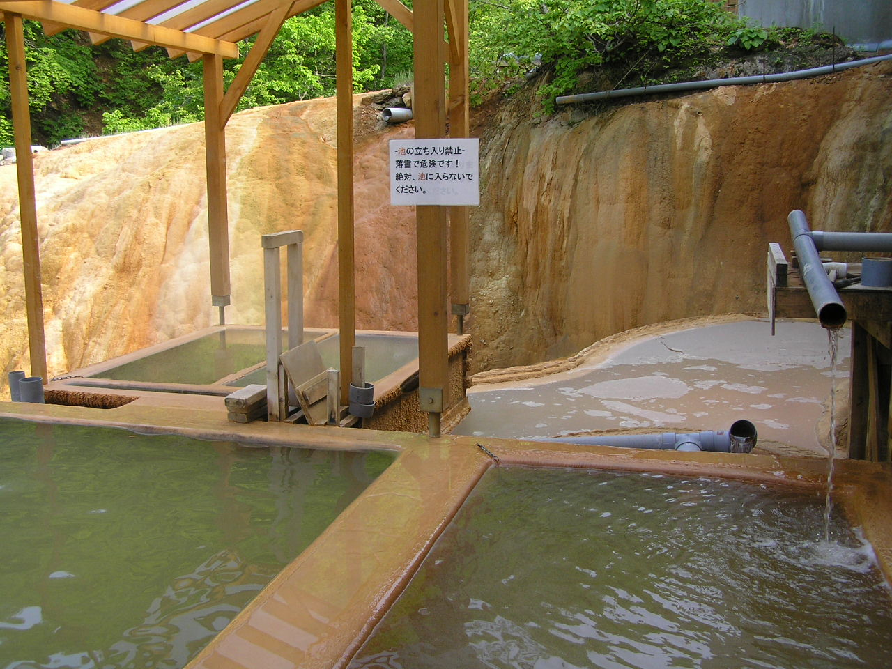 二股ラヂウム温泉露天風呂